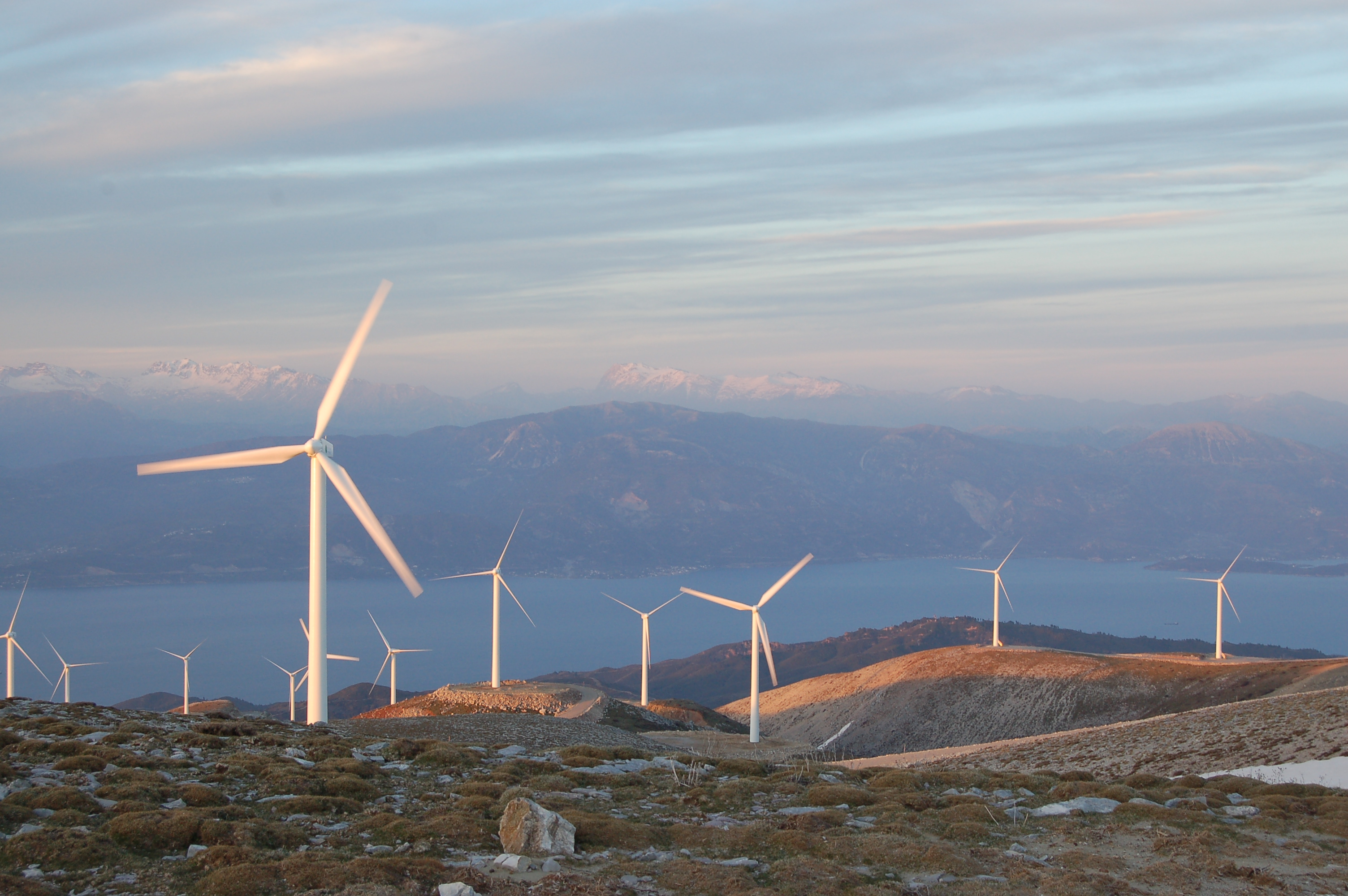 Θέα προς ΒΑ από την κορυφή του Παναχαϊκού...